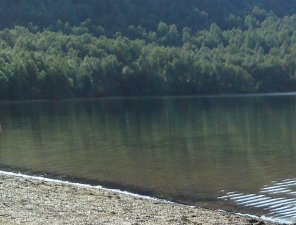 En sandstrand med Josefvatnet.